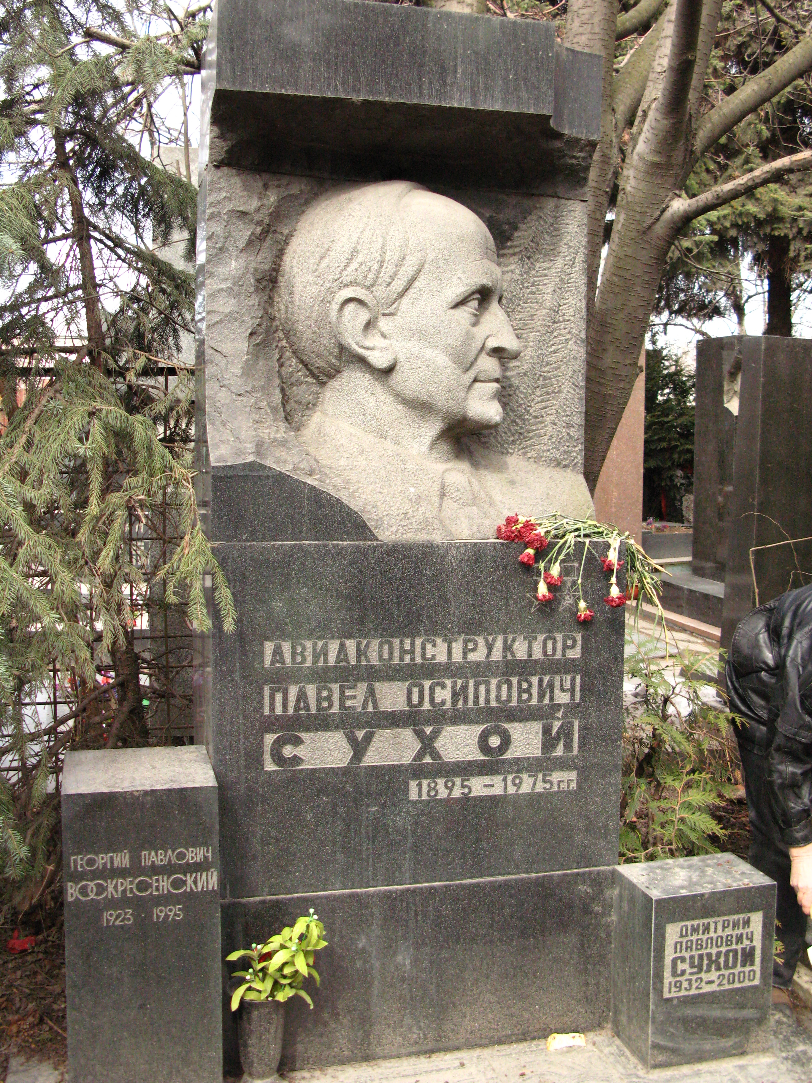 Павел Сухој. Новодевичи.